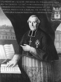 Charles François Joseph de Pisani de la Gaude (1743-1826) - bisschop van Namen (1804-1826) - Namen - Provincie Namen - België